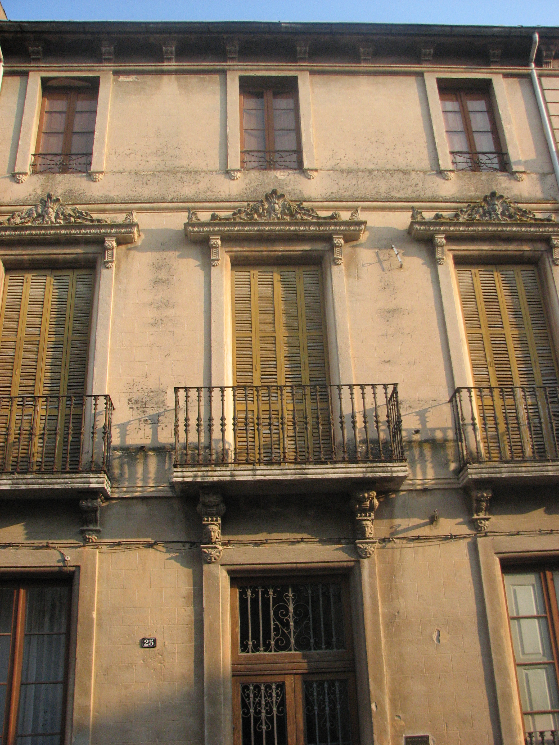 Can Massaguer (Santa Coloma de Farners)